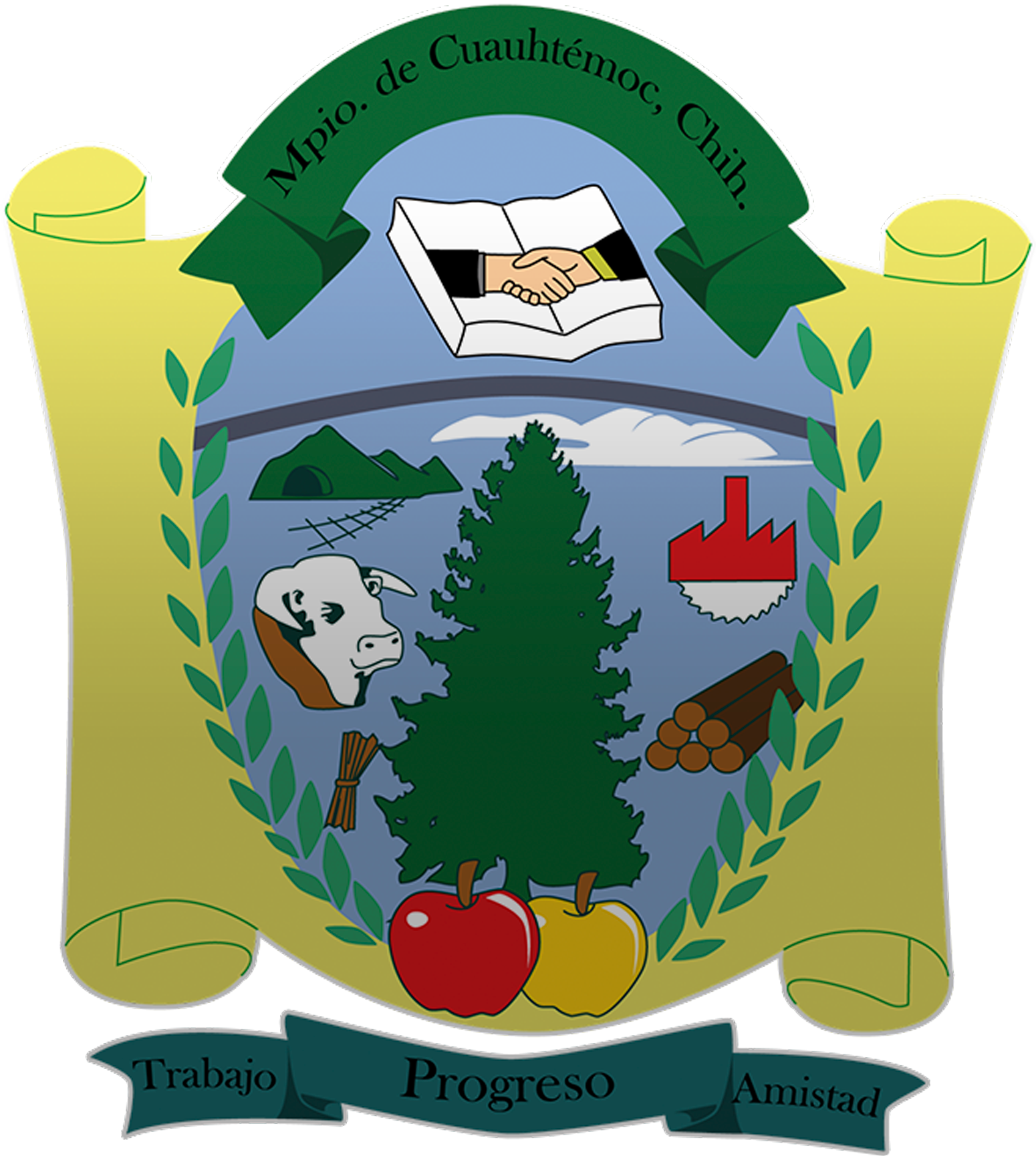 Escudo de Cuauhtémoc Chihuahua